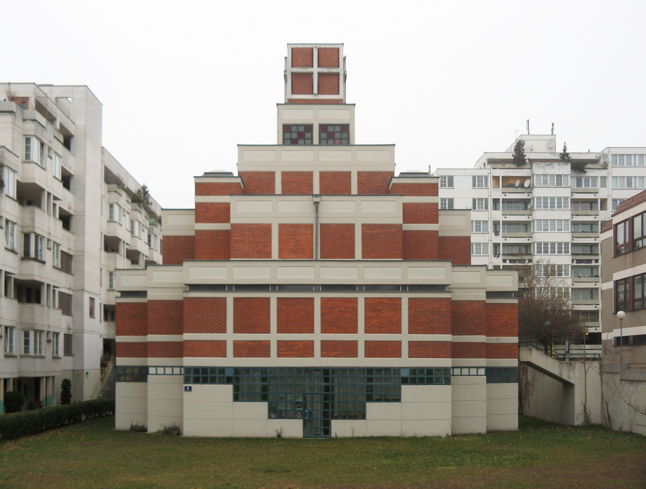 Kirche Am Schöpfwerk (1979-81) von Viktor Hufnagl in Wien-Meidling